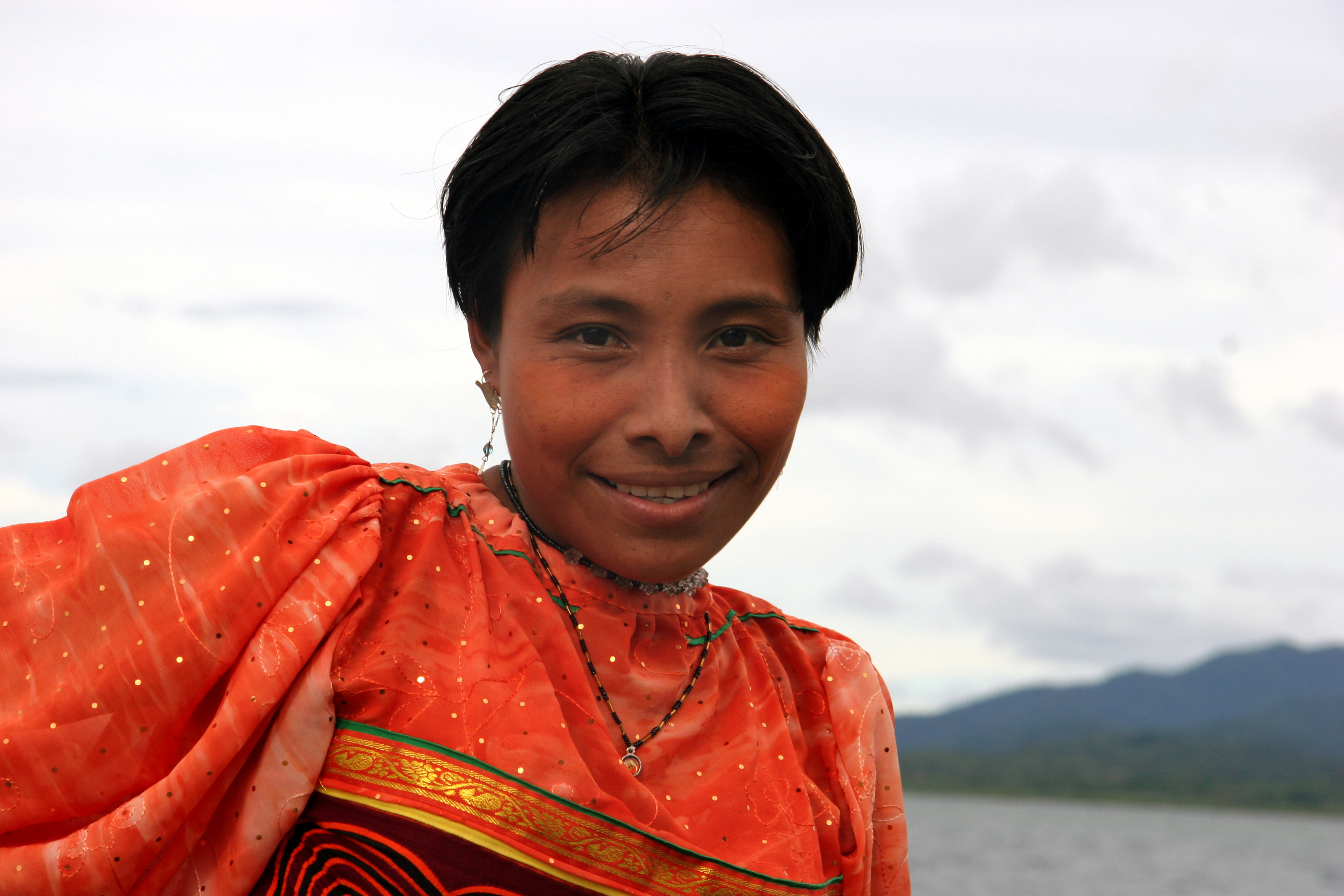 panama, ile des San Blas, femme Kuna